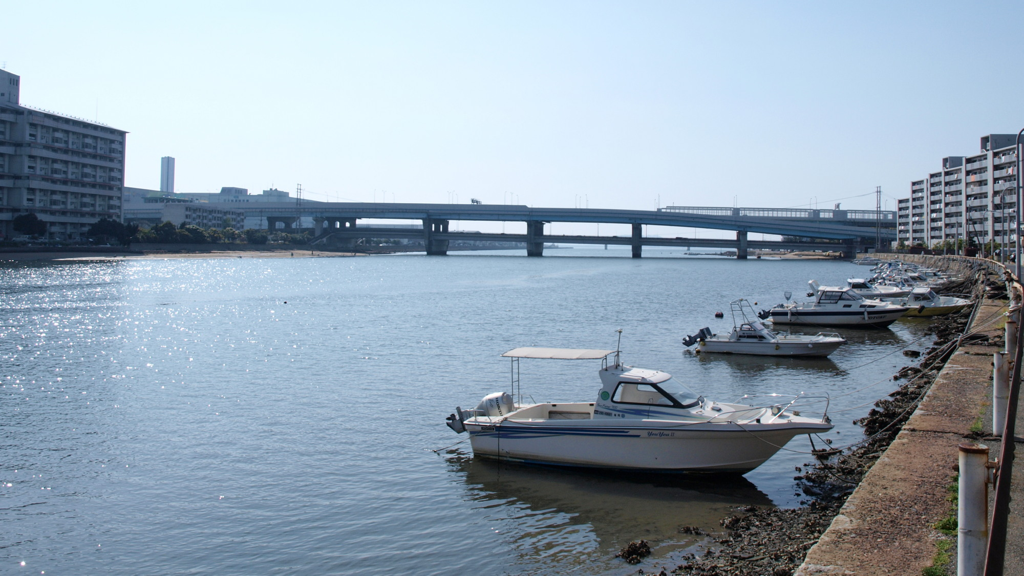 多々良川河口。2009/04/12撮影